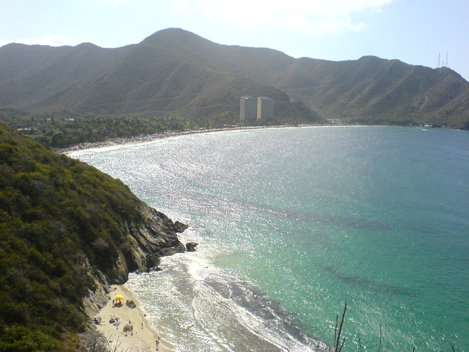 Cata, Aragua, Venezuela